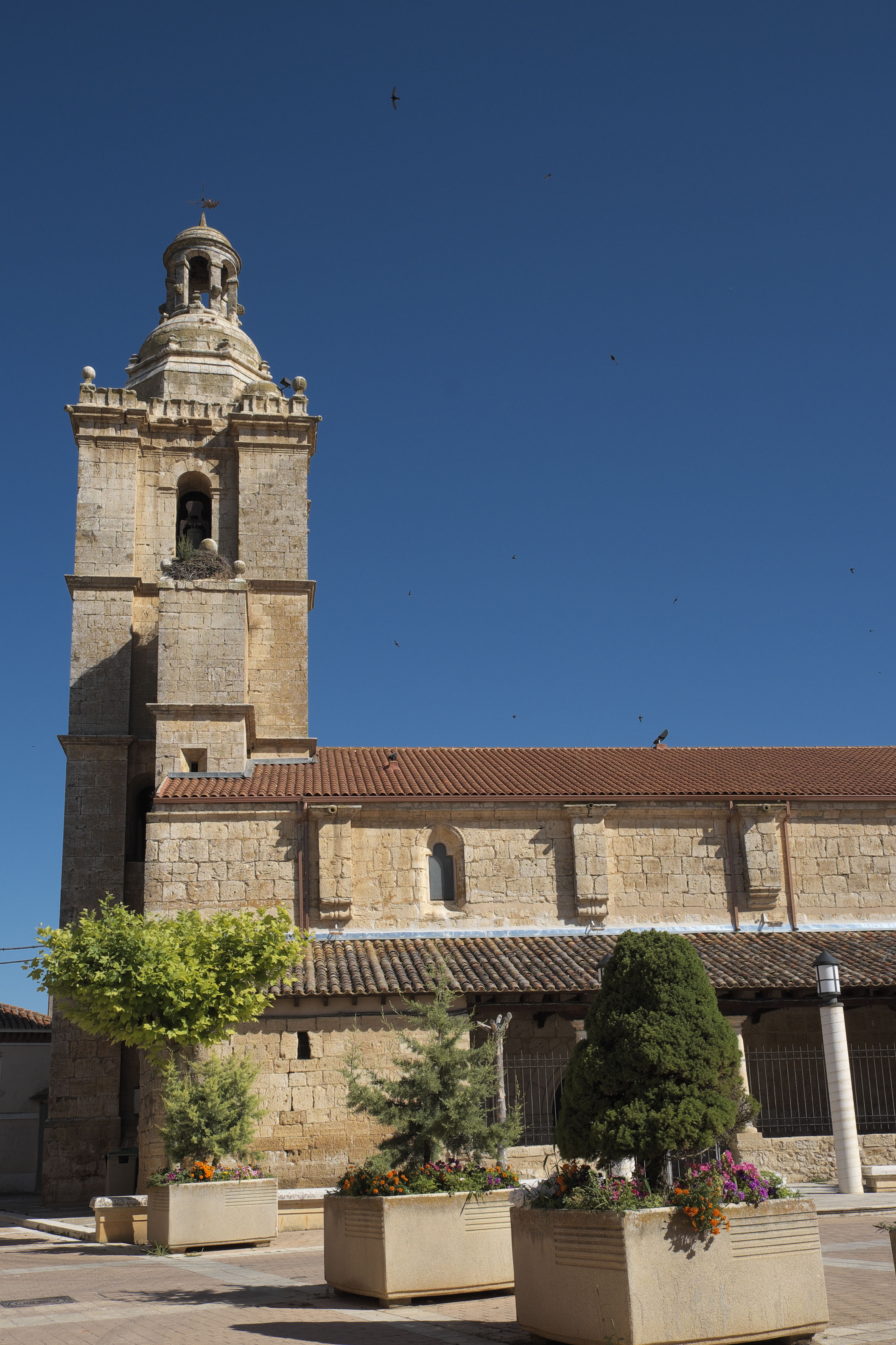 Katholische Pfarrkirche Inmaculada Concepción in Castromonte in der Provinz Valladolid (Kastilien-León/Spanien)